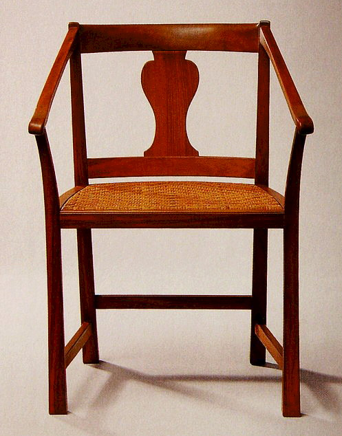 Chair — Carl Malmstens Stuhl von 1915